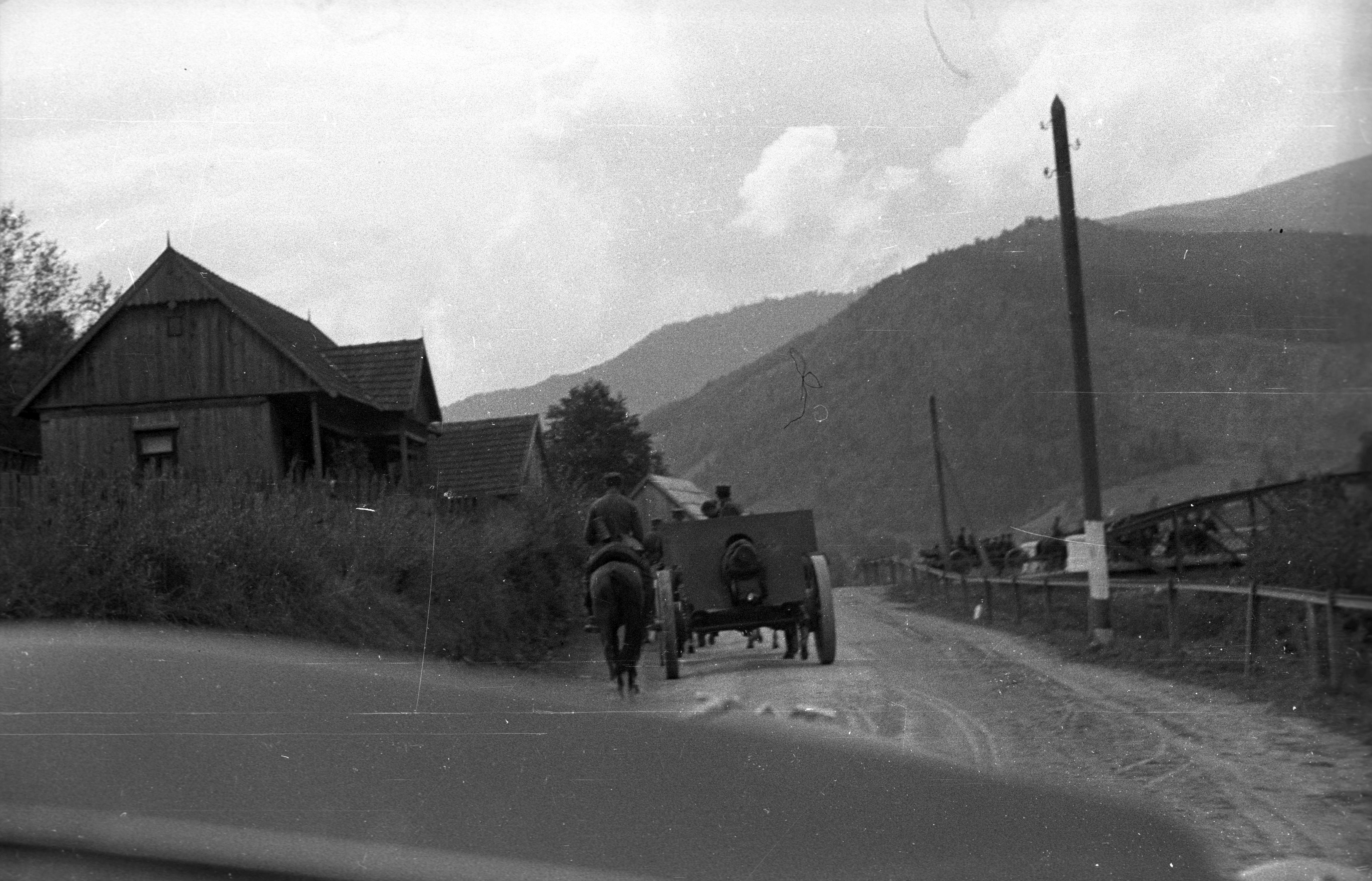 országút a várostól délre, a Fekete-Tisza hídja közelében. Location: Ukraine, Yasinia Tags: Polish soldier, artillery, bridge, ordnance, wooden cottage, Transcarpathia Title: országút a várostól délre, a Fekete-Tisza hídja közelében.